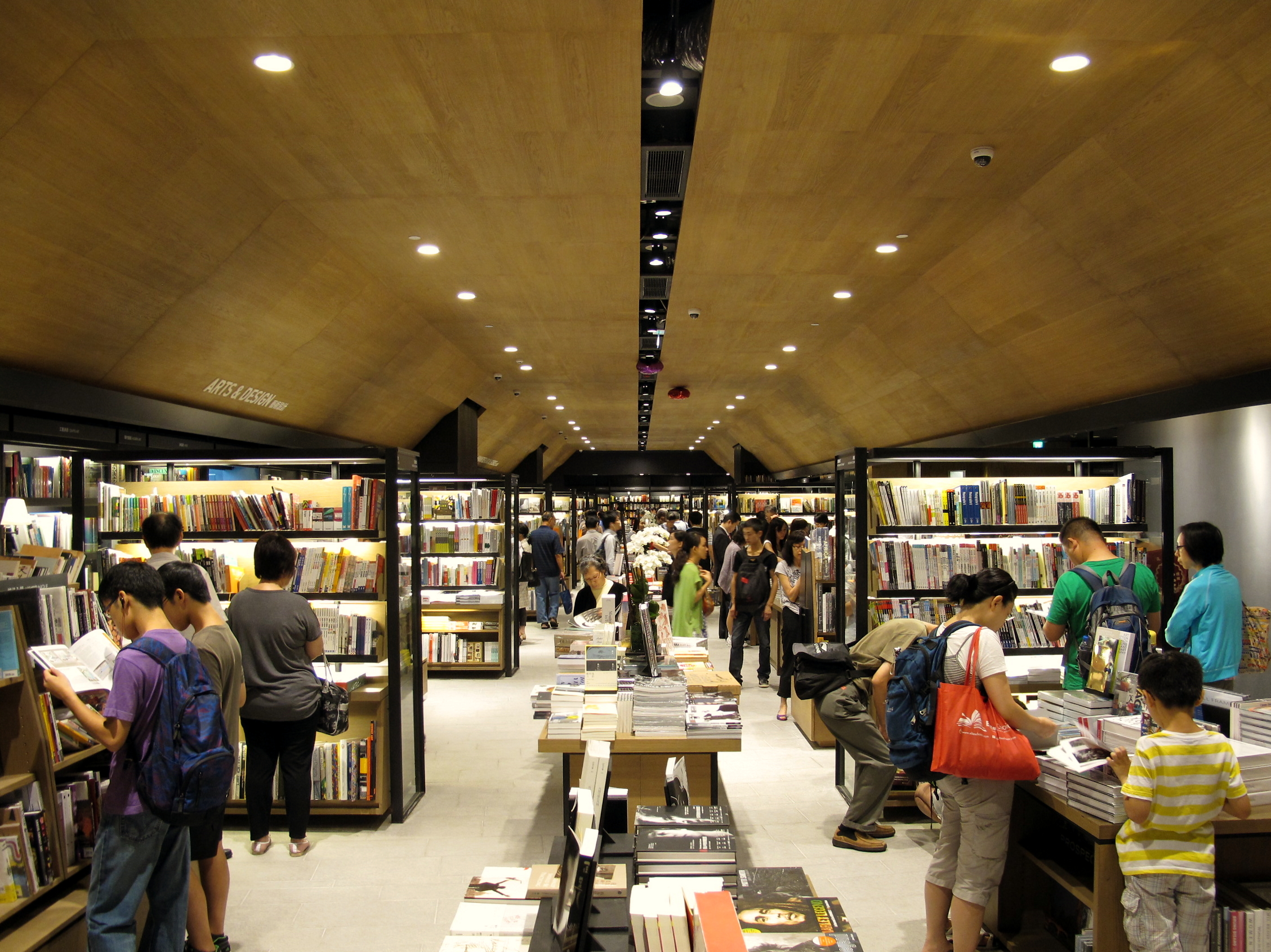 Hysan Place eslite Level 9